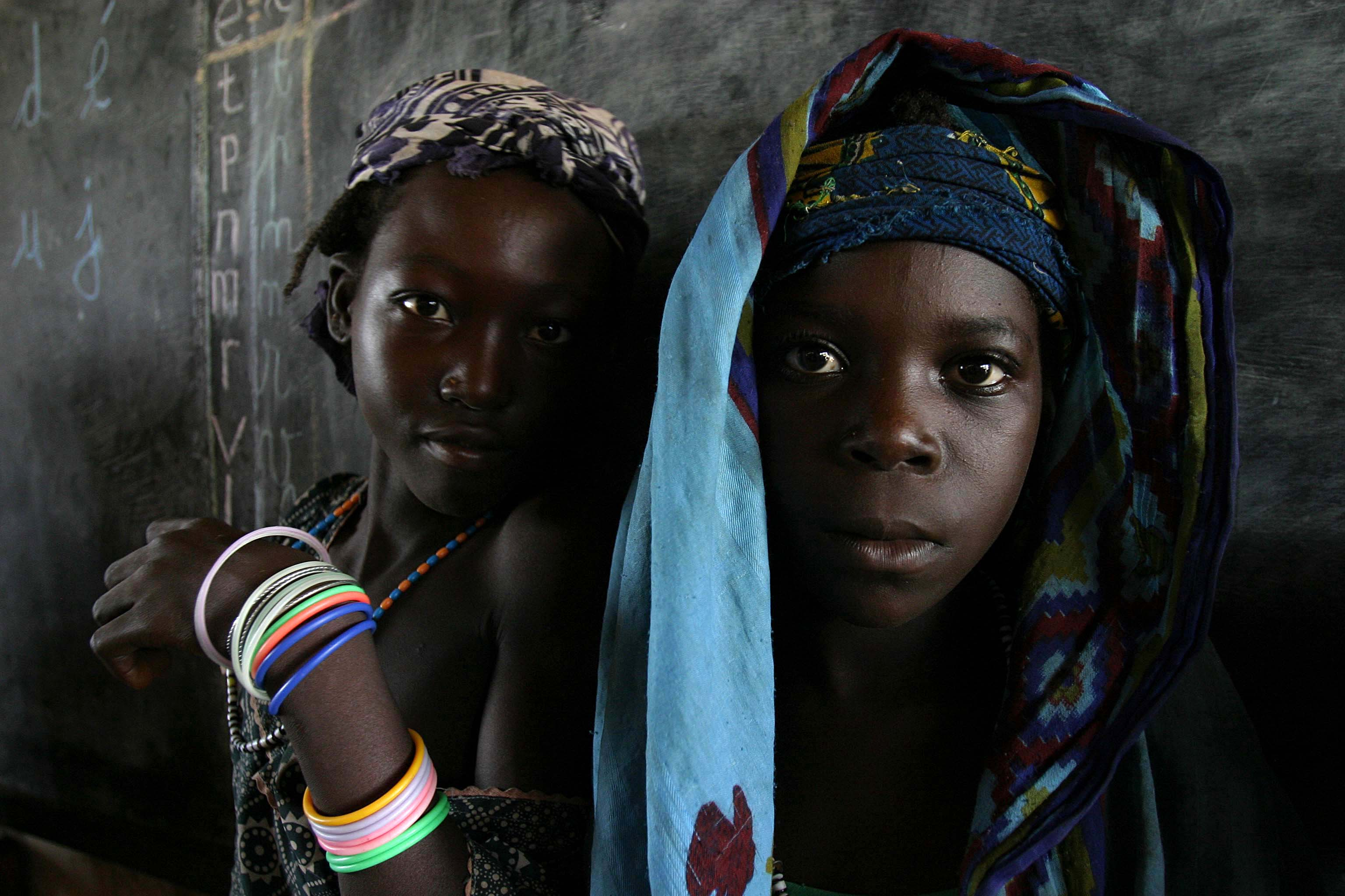 © Pierre Holtz | UNICEF